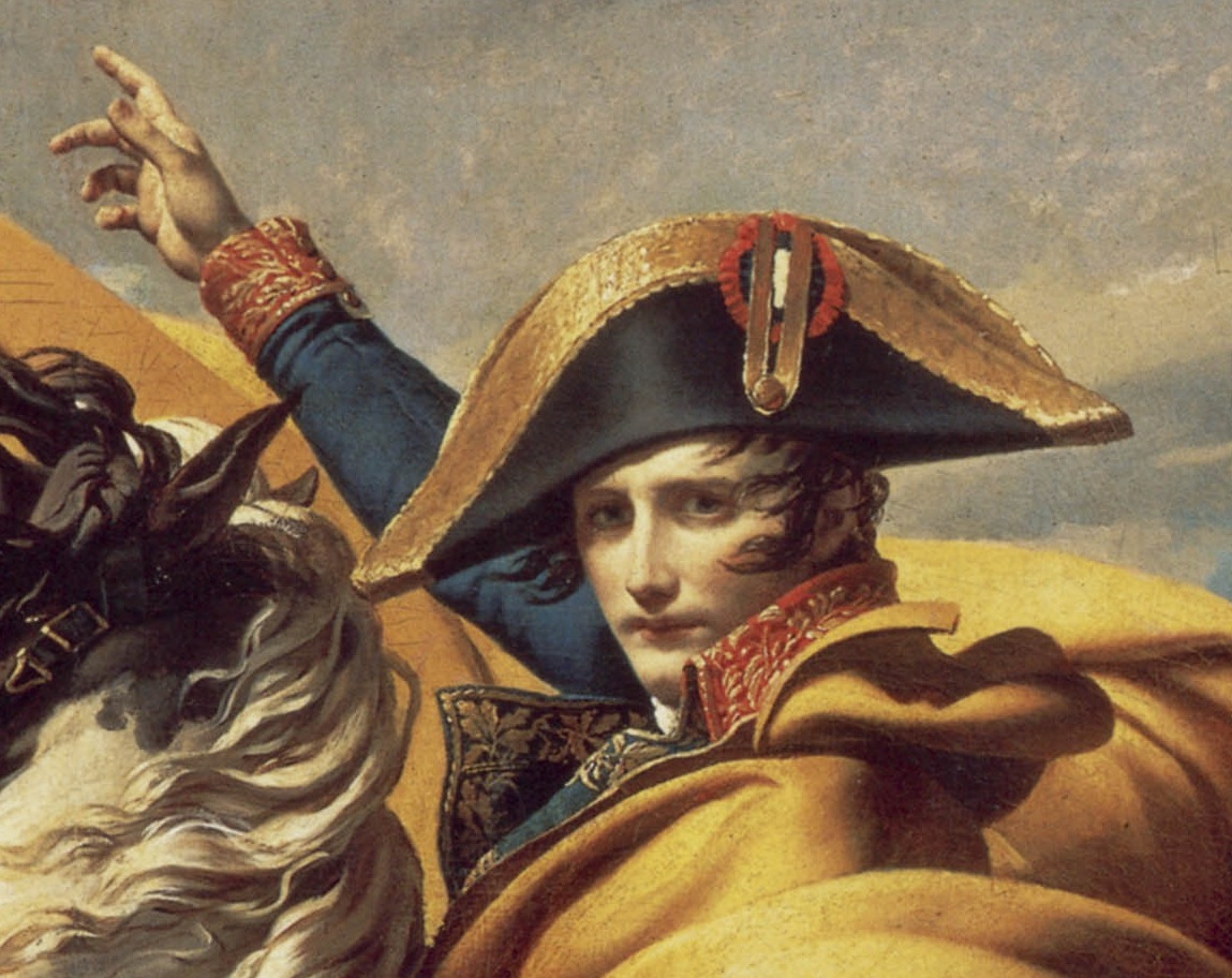 Détail du visage et du geste de napoléon dans le tableau Bonaparte au Grand-saint-Bernard